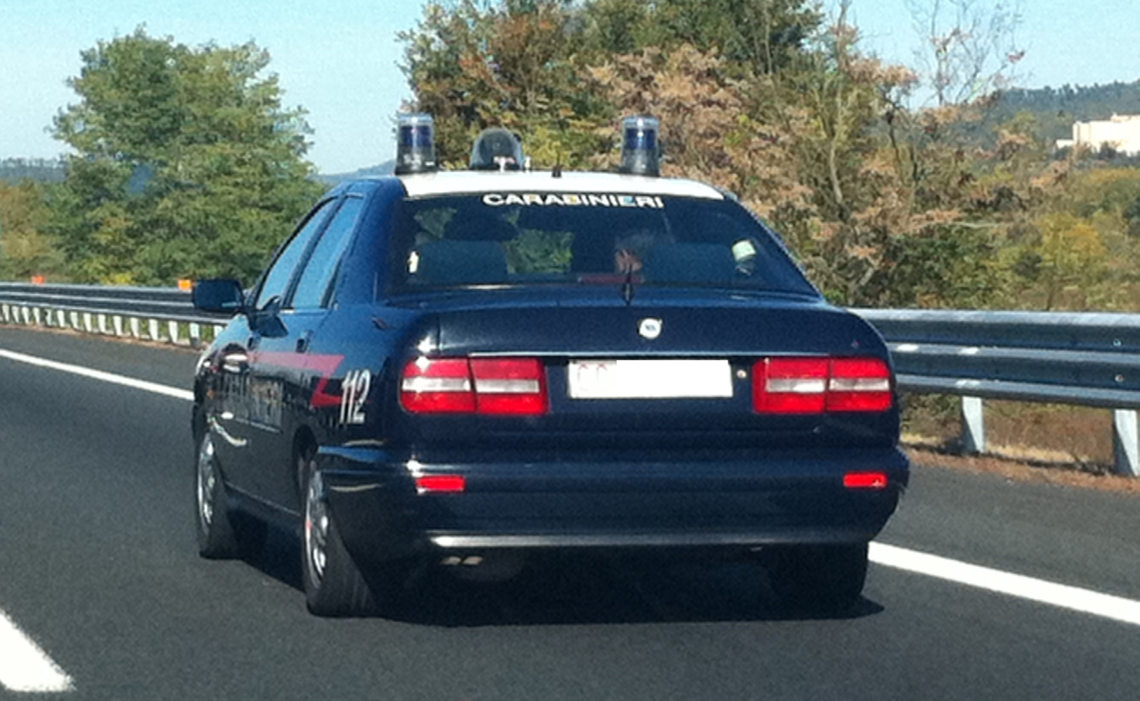 Lancia K - Arma dei Carabinieri - Comando Carabinieri Banca d'Italia (targa oscurata)